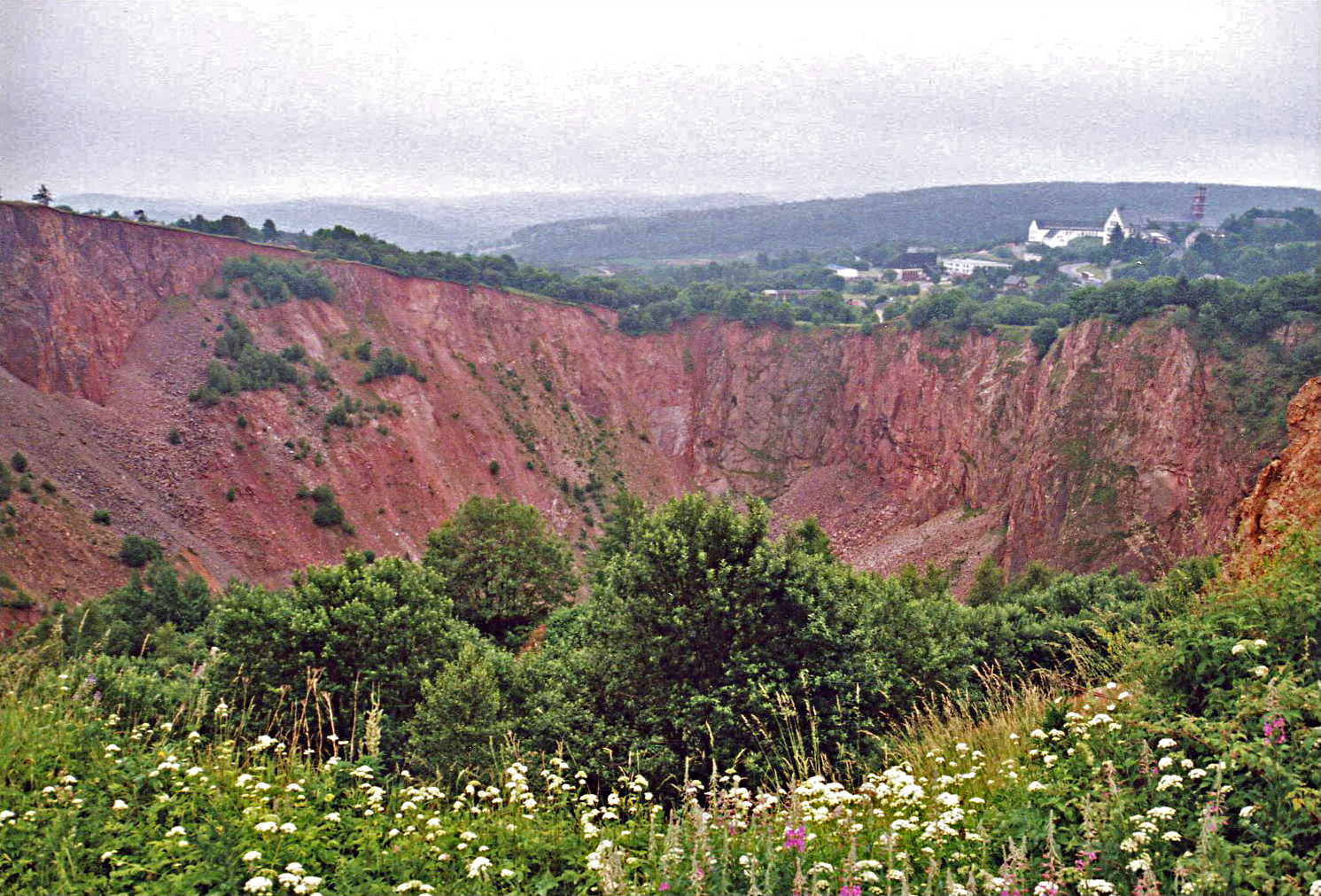 Altenberg (Erzgebirge): Blick über die Pinge. Im Hintergrund sind die Übertageanlagen des 1991 stillgelegten Zinnbergbaus sichtbar.